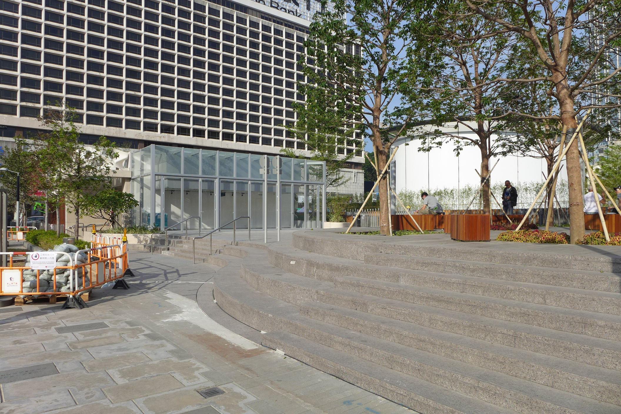 Salisbury Garden